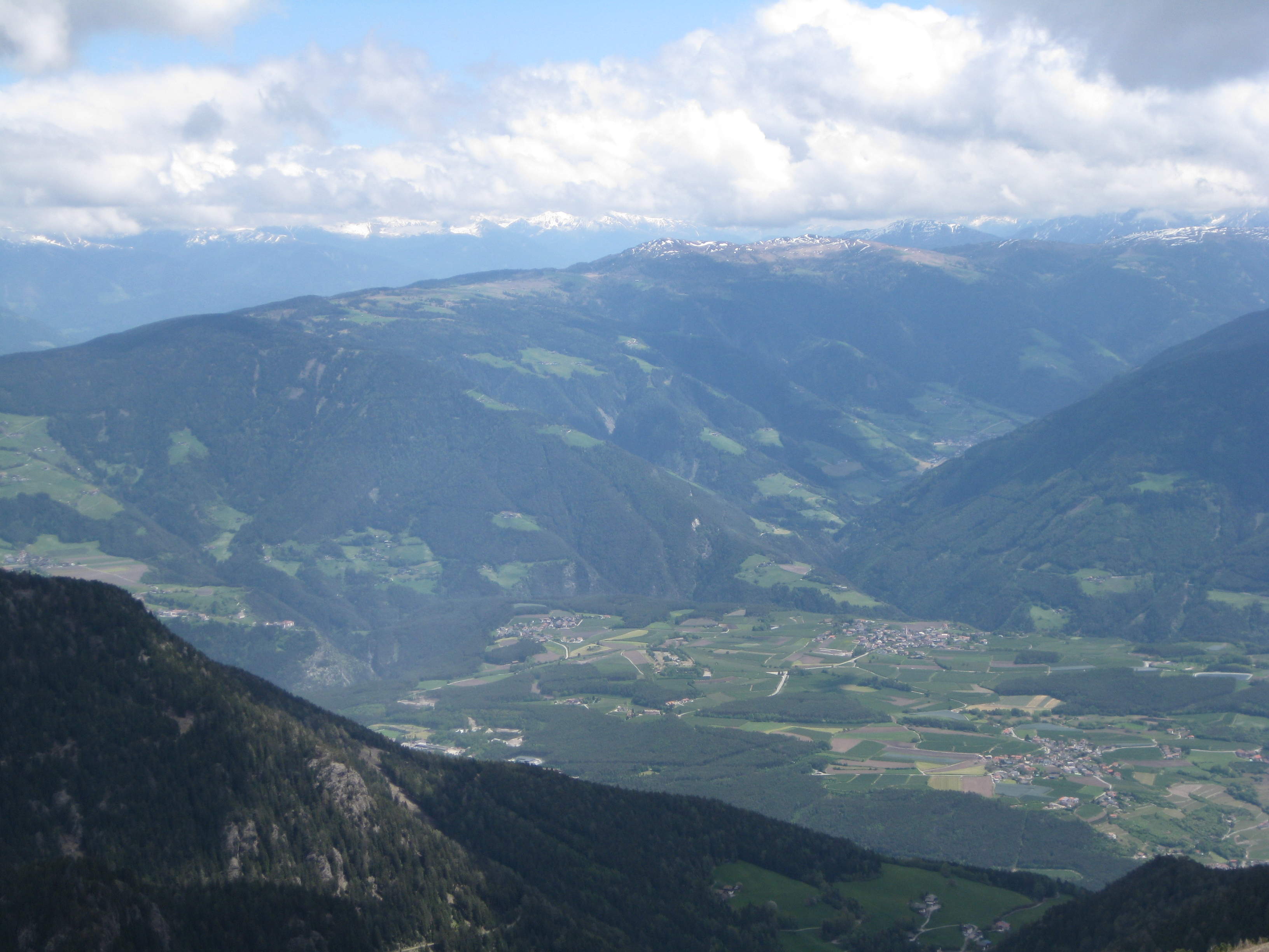 Blick auf den nördlichen Brixner Talkessel (Raas, Natz, Viums), im Hintergrund der Eingang des Lüsner Tals und die Lüsner/Rodenecker Almen von der Karspitze aus gesehen